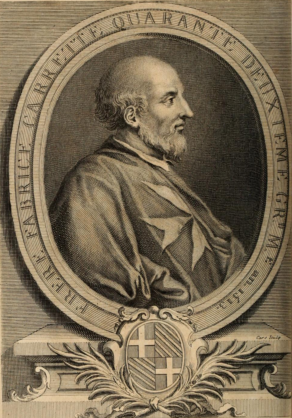 grand maître de l'ordre de Saint-Jean de Jérusalem